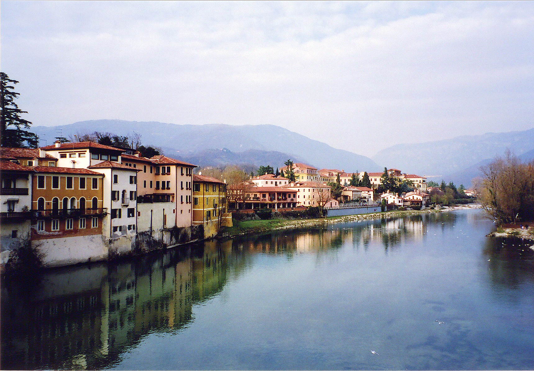 The Brenta River in Bassano del Grappa, Veneto, Italy.Brenta River, Bassano